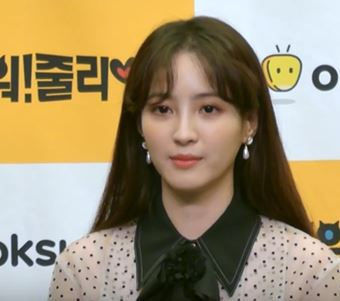 8일 오후, 서울시 마포구 상암동 '스탠포드호텔 서울'에서 옥수수 오리지널 '너 미워! 줄리엣' 제작발표회가 열려 김정권PD, 배우 한상진, 최웅, 문수빈, 이홍기, 정혜성이 참석해 각 배역 캐릭터를 설명하고 있다.